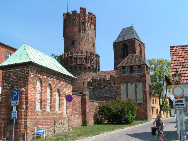 Tangermünde, Urba pordego Neustädter Tor